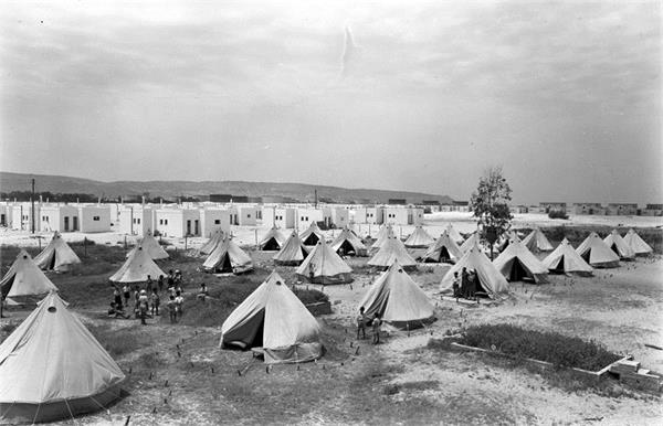 מפרץ חיפה - שיכון ארעי לעולים בין קרית חיים וקרית מוצקין.